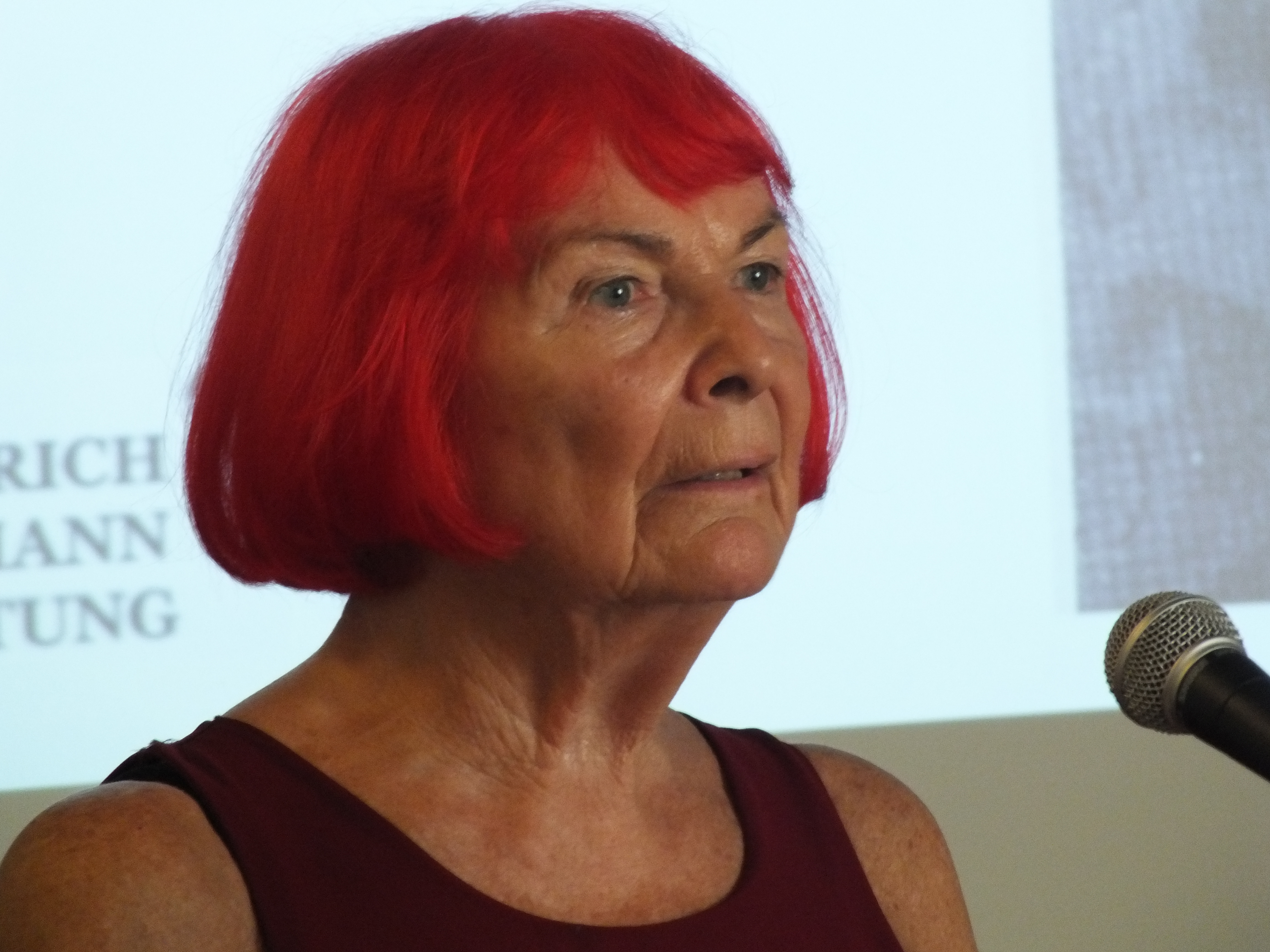 Crista Randzio-Plath